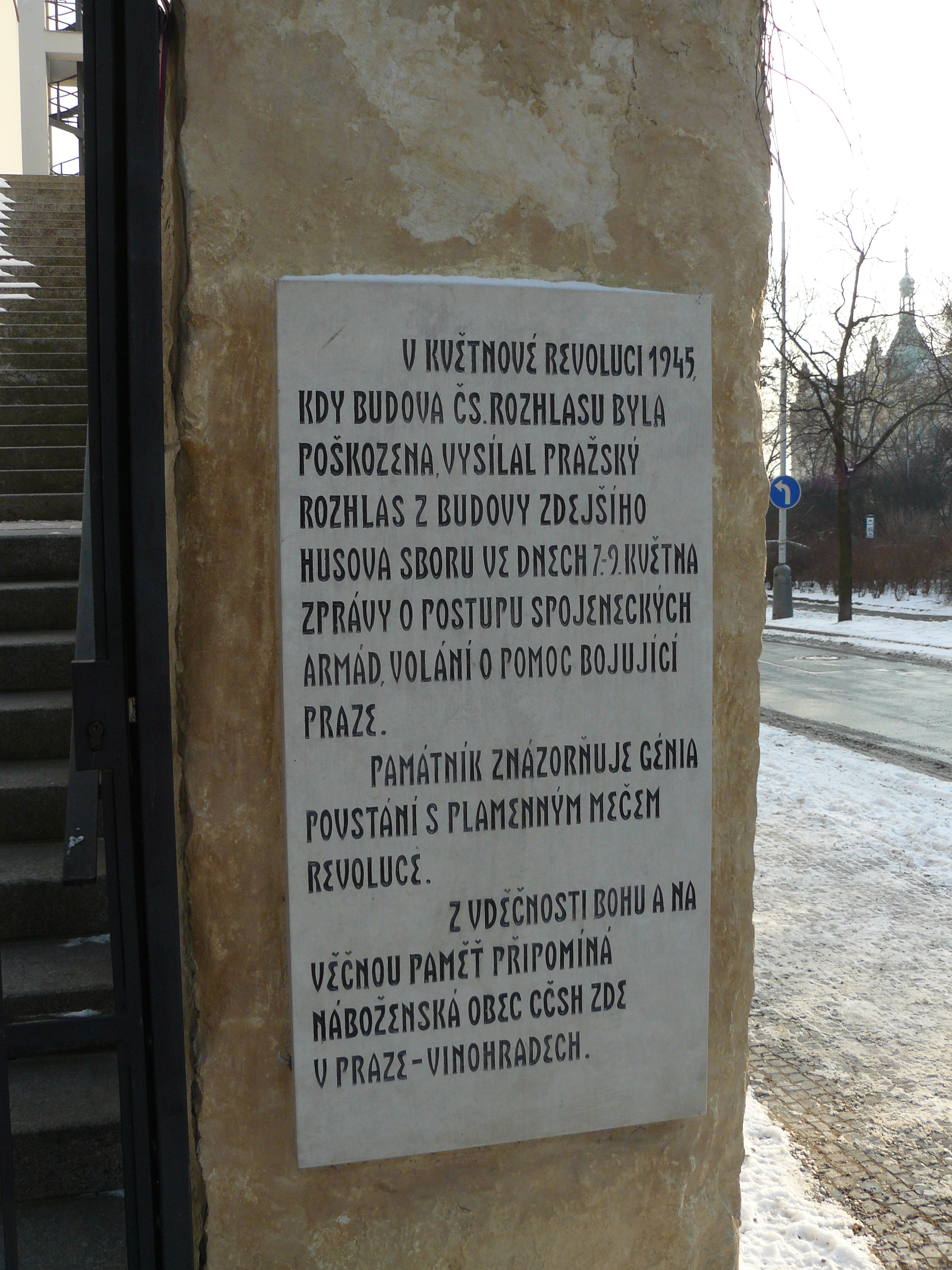 Husův sbor na Vinohradech - pamětní deska